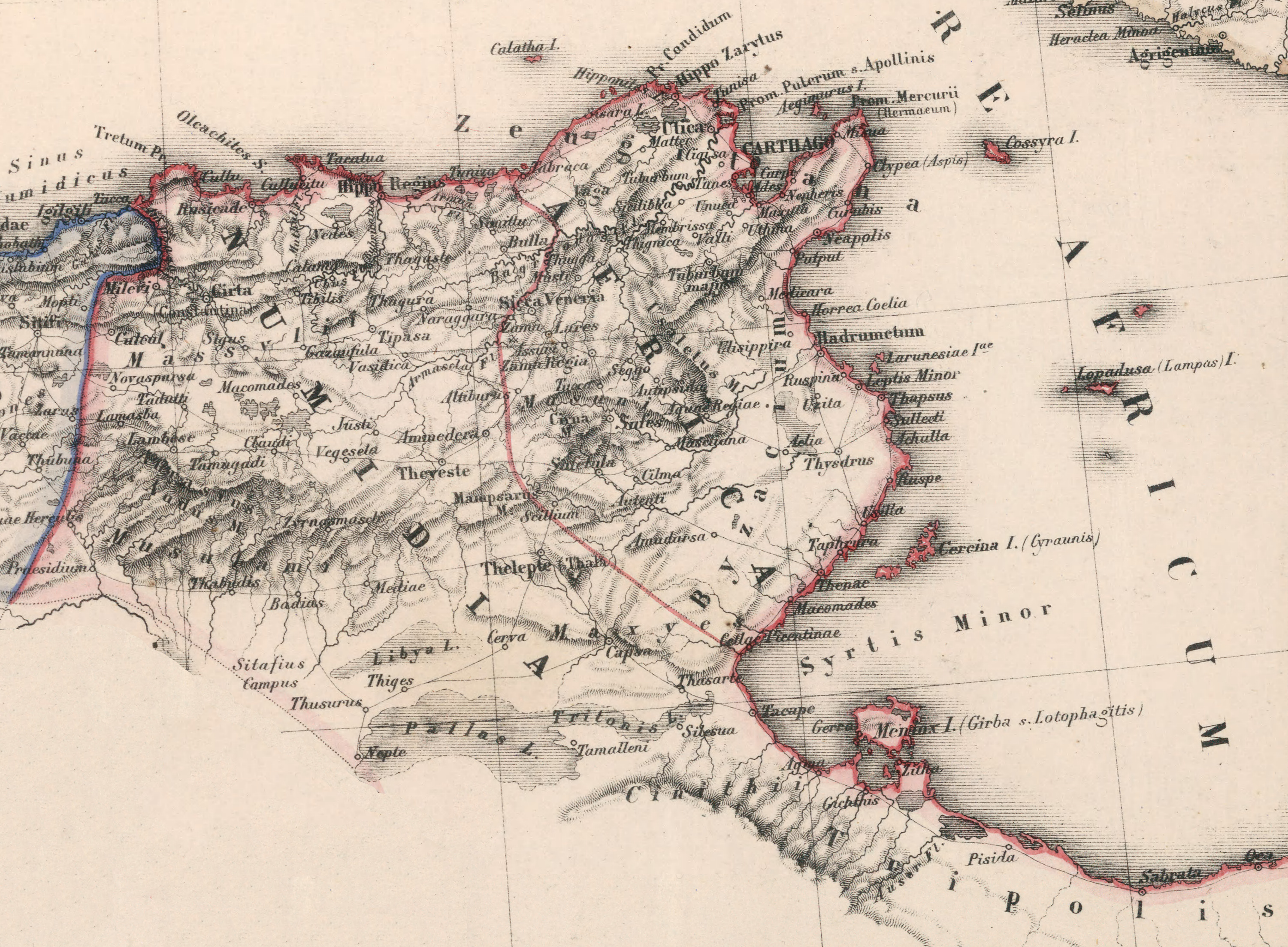 Römisches Nordafrika: Numidien